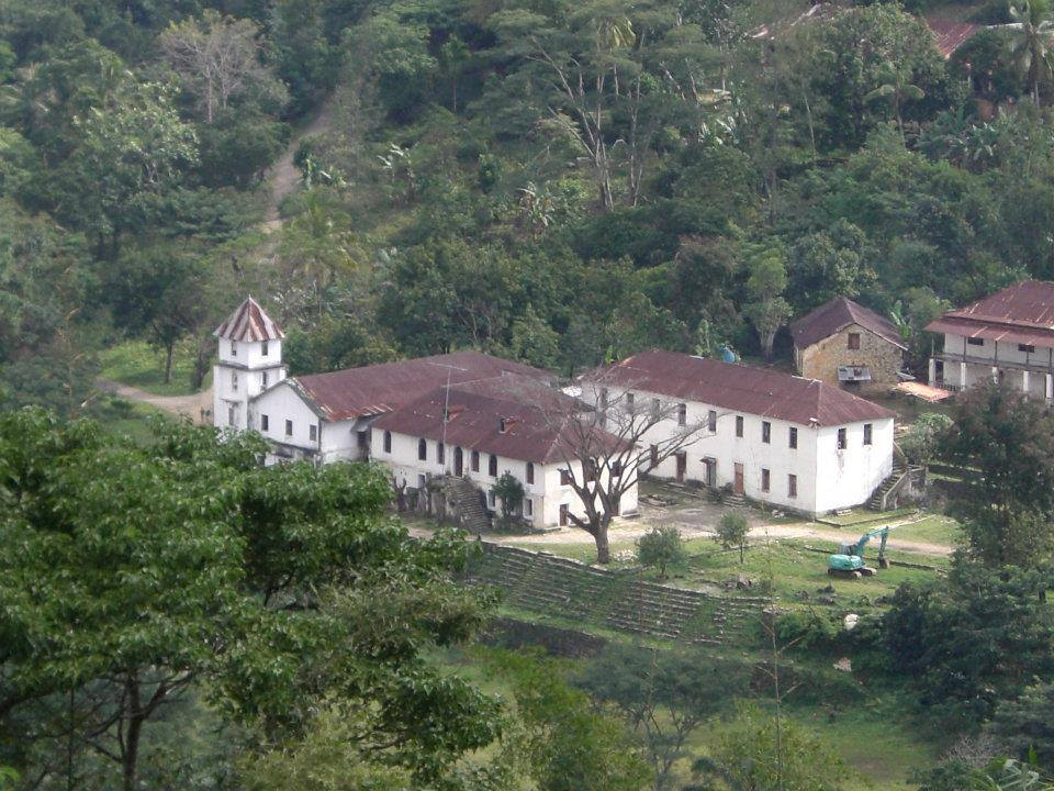 Colégio in Soibada